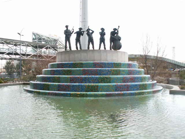 מרכז עזריאלי ת"א Azriely Towers - Tel-Aviv - Israel צולם על-ידי אבי קדמי ב- 2006.